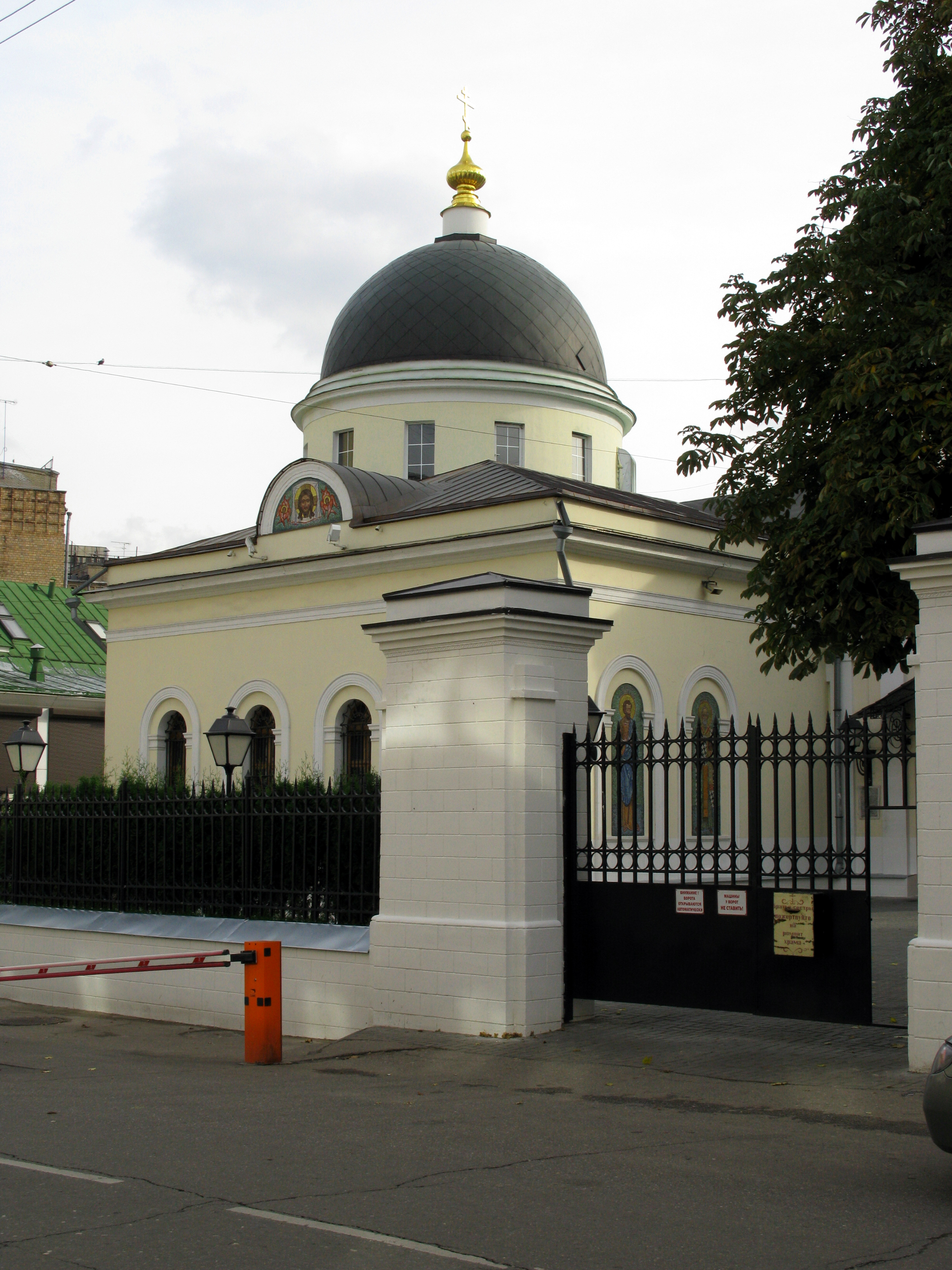 Церковь Святого Апостола Иакова Зеведеева в Казенной Слободе